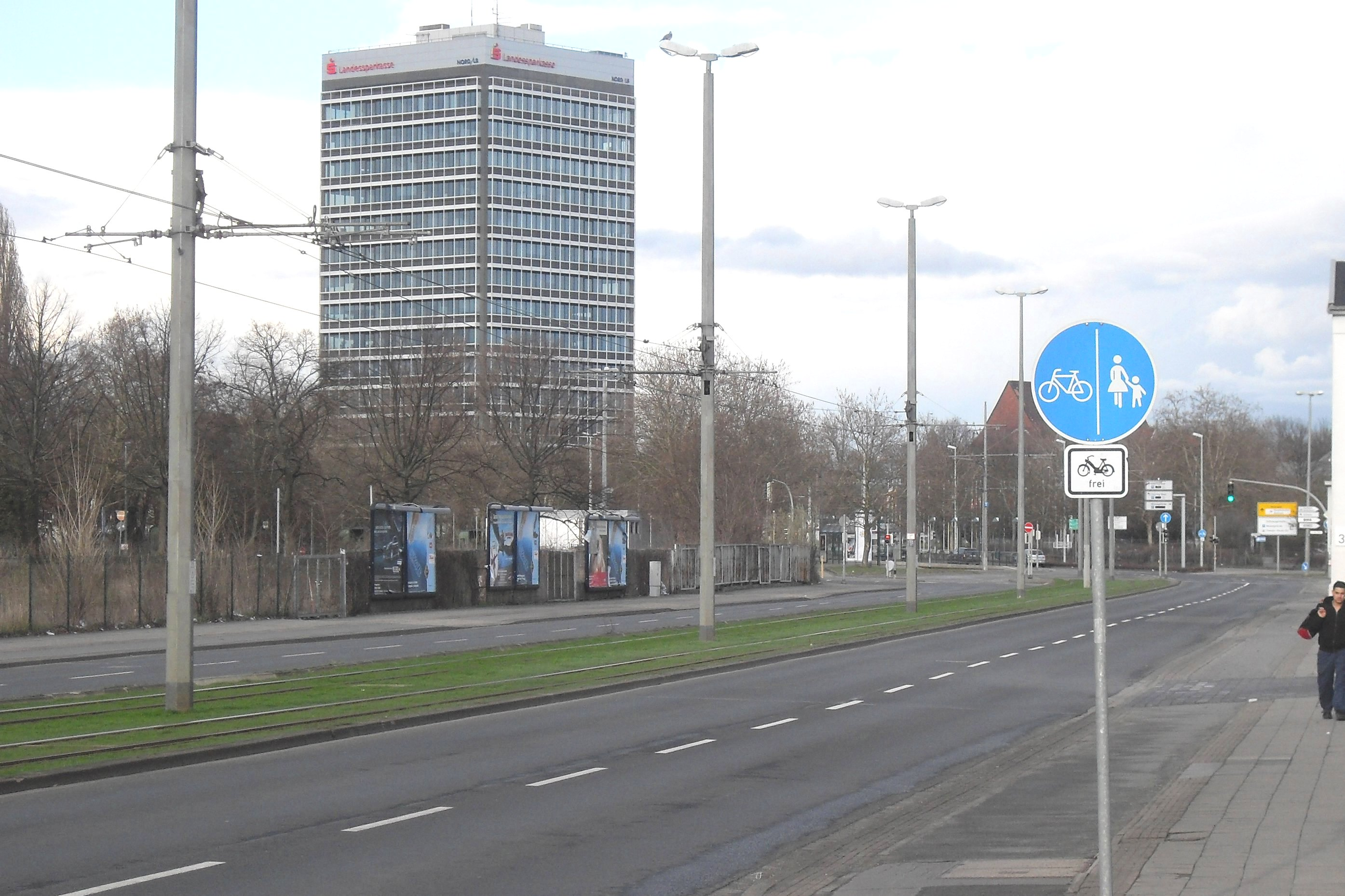 Blick auf die Frankfurter Straße in Richtung Europaplatz, im Hintergrund das Nord-LB Hochhaus